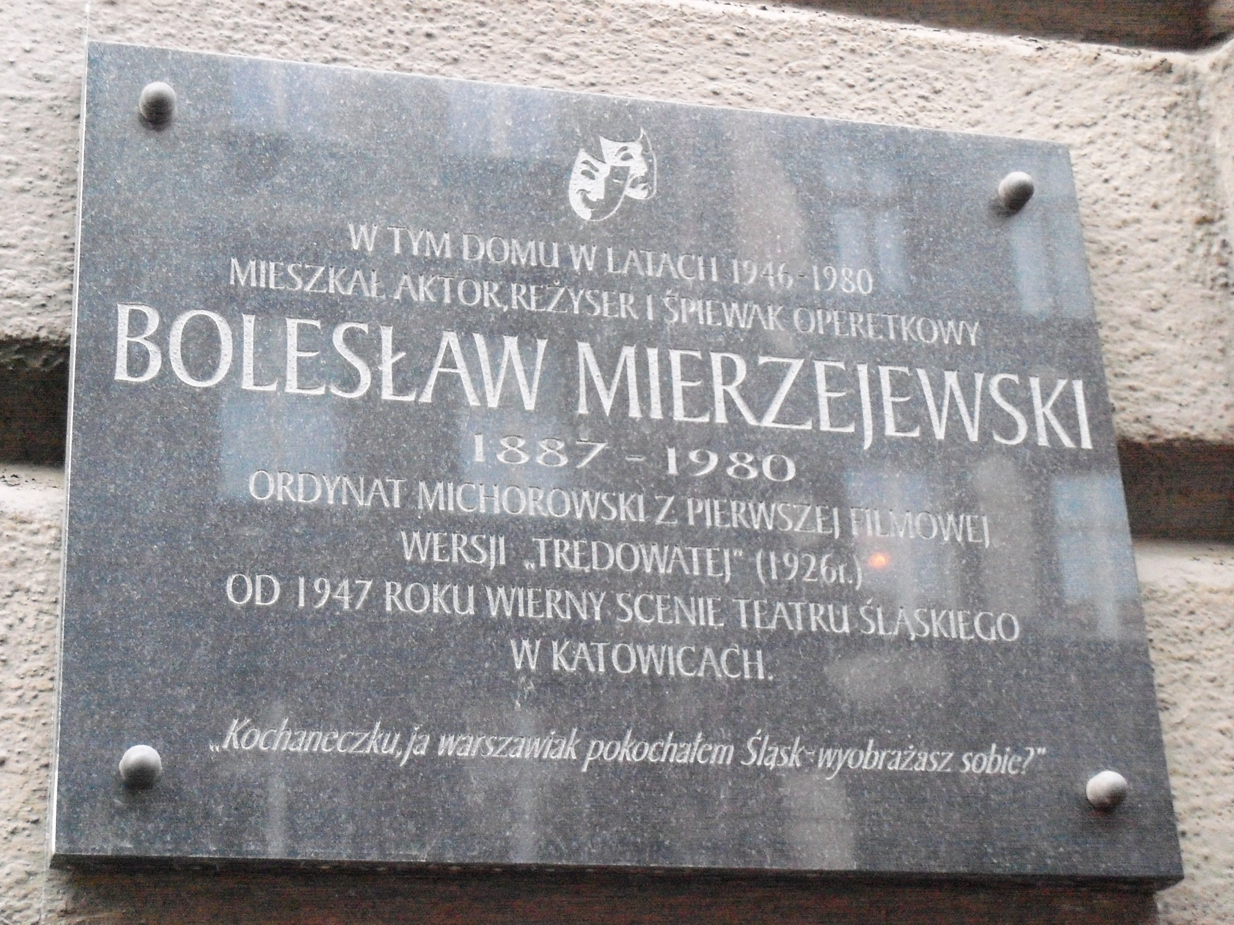 tablica pamiątkowa, poświęcona Bolesławowi Mierzejewskiemu, umieszczona na fasadzie budynku przy ul. Gliwickiej 9 w Katowicach